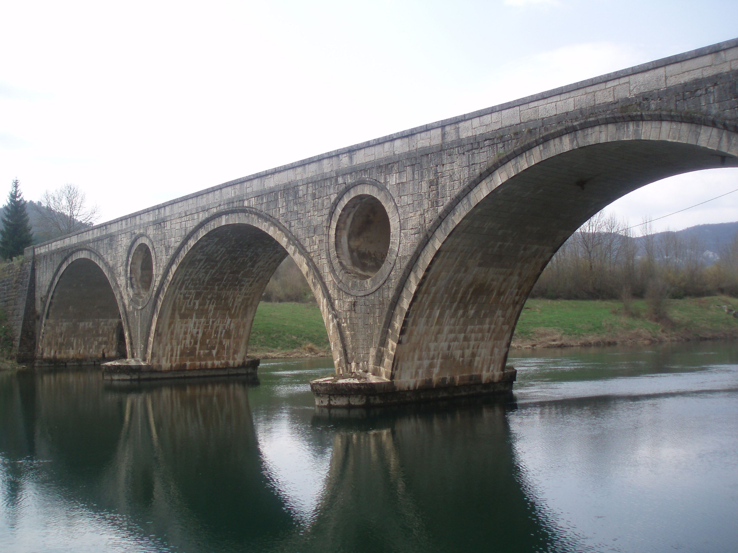 Kosinjski most preko rijeke Like